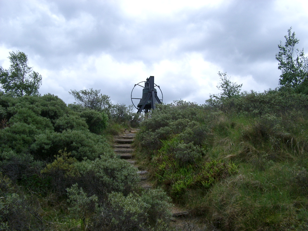 De bekende klok op de Waalsdorpervlakte